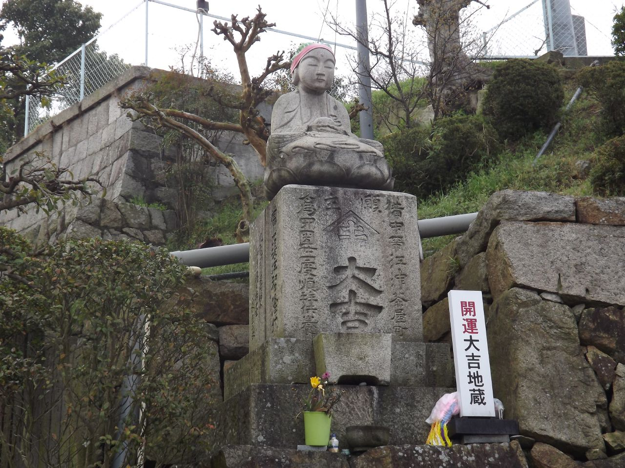 郷照寺の開運大吉地蔵